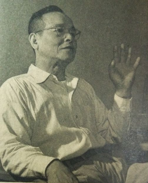 土居明夫